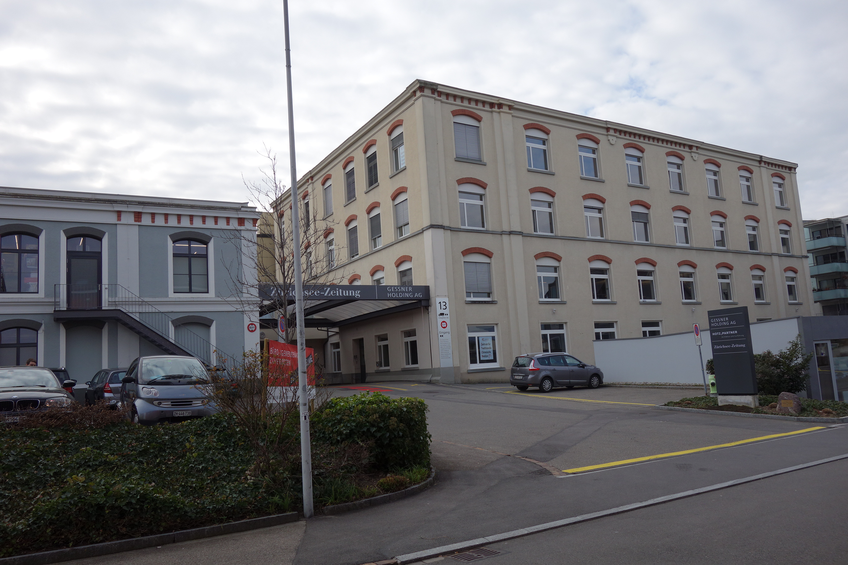 Ehemalige Seidenweberei Gessner, Wädenswil ZH, Schweiz